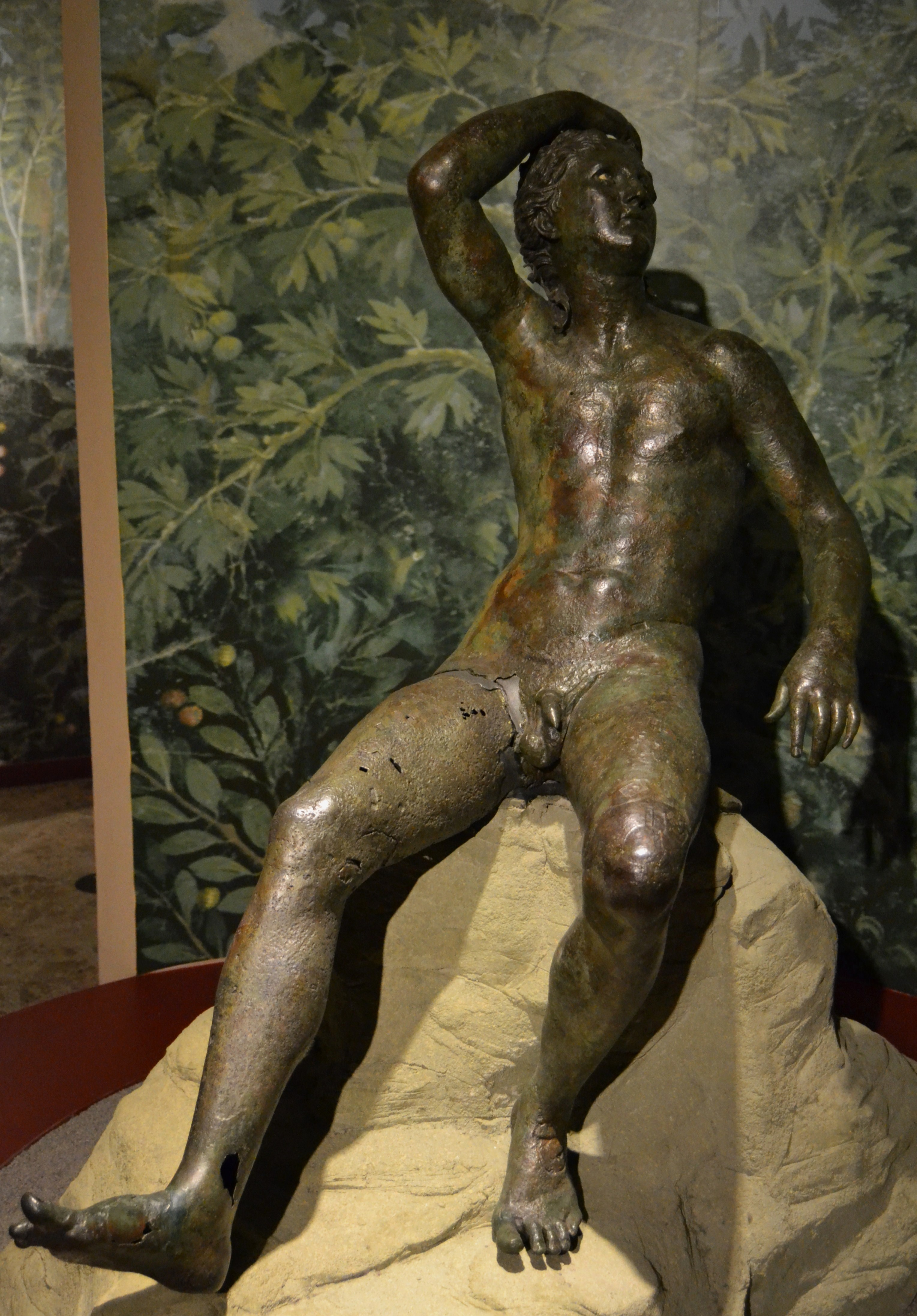 Escultura que s'ha identificat amb el déu Apol·lo, trobada el 8 de desembre de 1963 en aigües de Pinedo, d'on pren el nom. L'escultura és una còpia romana de l'Apo·lo Delphinios fet per Demetri de Milet al final del segle II a. C. La posició doblegada del braç esquerre indica que degué recolzar algun objecte o instrument, probablement la cítara o la lira.